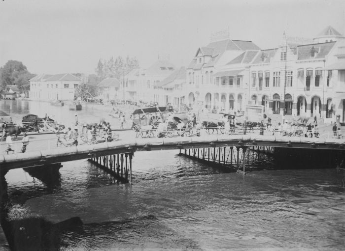 foto. De Roode Brug over de Kali Mas bij de Willemskade, Soerabaja